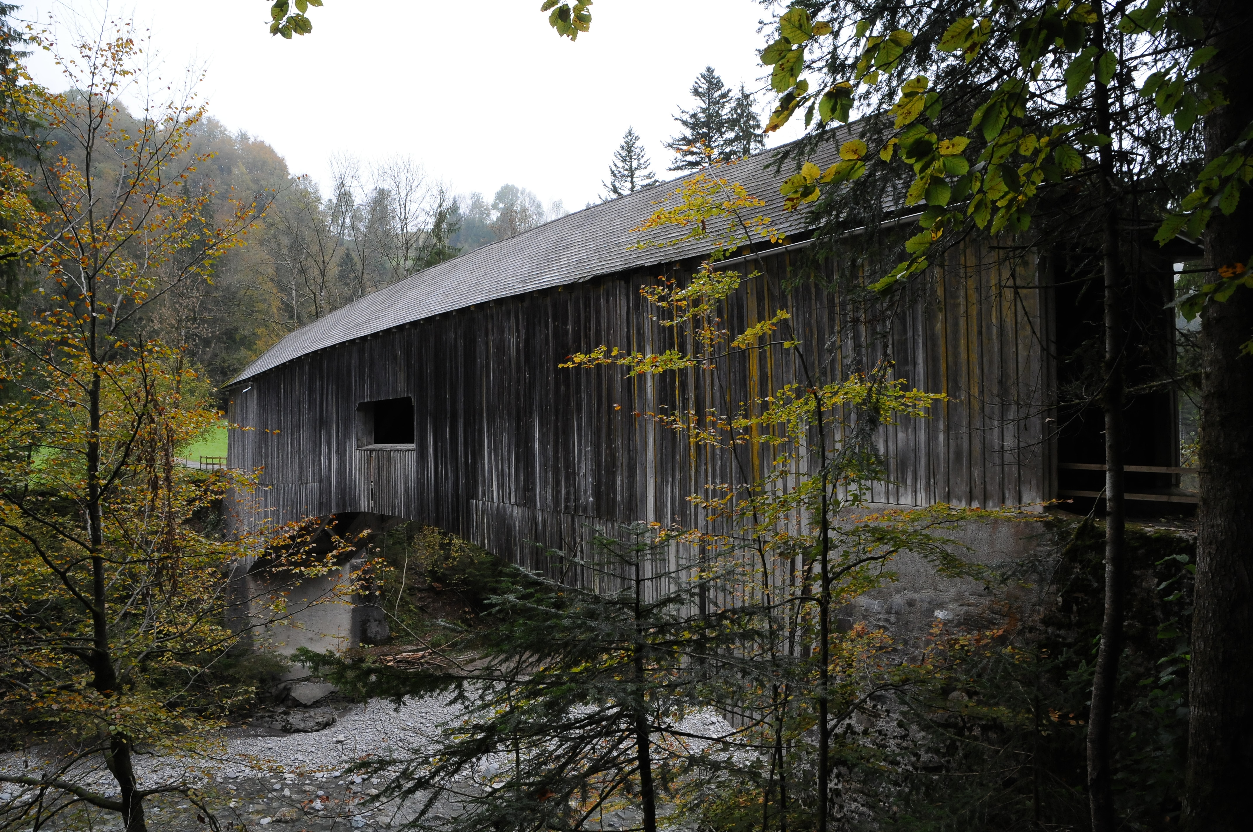 aus dem DEHIO Vorarlberg 1983: Gschwendtobel-Brücke über die Subersach. Errichtet 1830 nach Plänen von Alois Negrelli. Gedeckte Holzbrücke mit 6fach verstärktem Hängesprengwerk. *** In Lingenau im Bregenzerwald , Vorarlberg